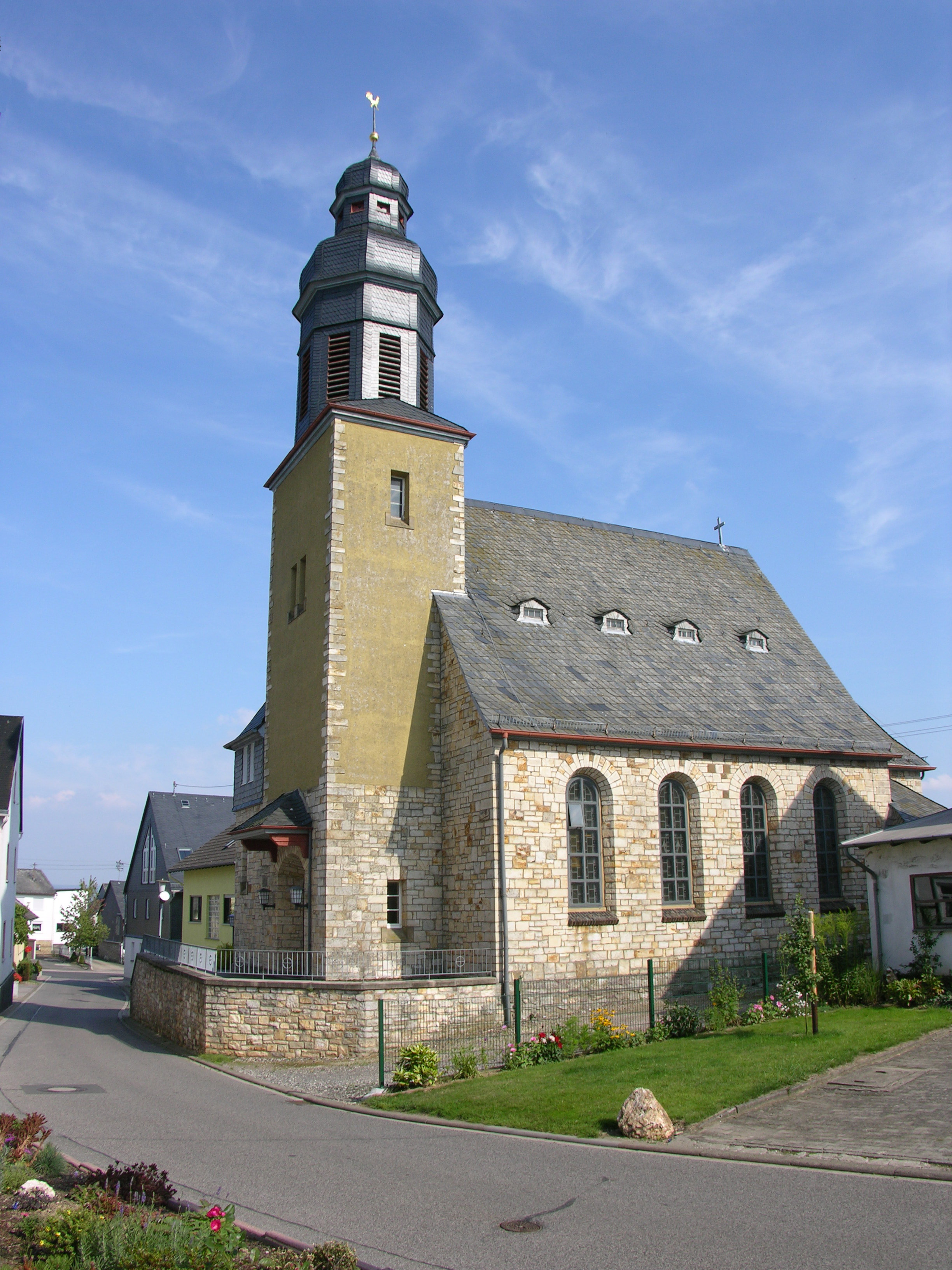 Die evangelische Pfarrkirche von Dickenschied im Hunsrück, Wirkungsstätte des Pfarrers Paul Schneider von 1934 bis 1937.